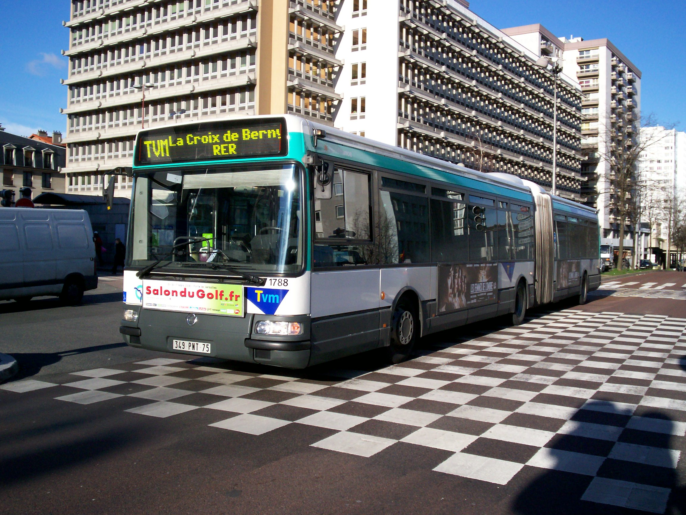 Bus Agora L Euro3 en direction d'Antony